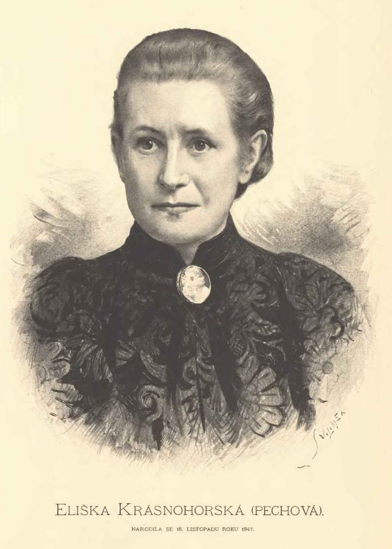 Portréty českých osobností od Jana Vilímka